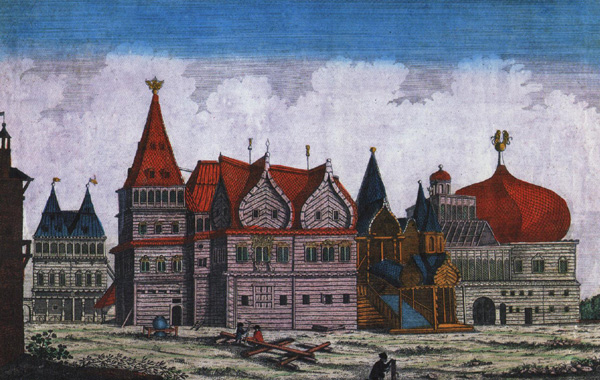 Деревянный дворец в Коломенском. Wooden palace in Kolomenskoe. 18th century (1780) colored engraving.